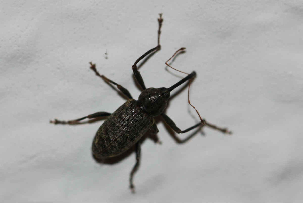 Langarmiger Spießrüssler (Dorytomus longimanus), Männchen, Länge ohne Rüssel etwa 7mm, 25.2.2017 im Raum Schwetzingen